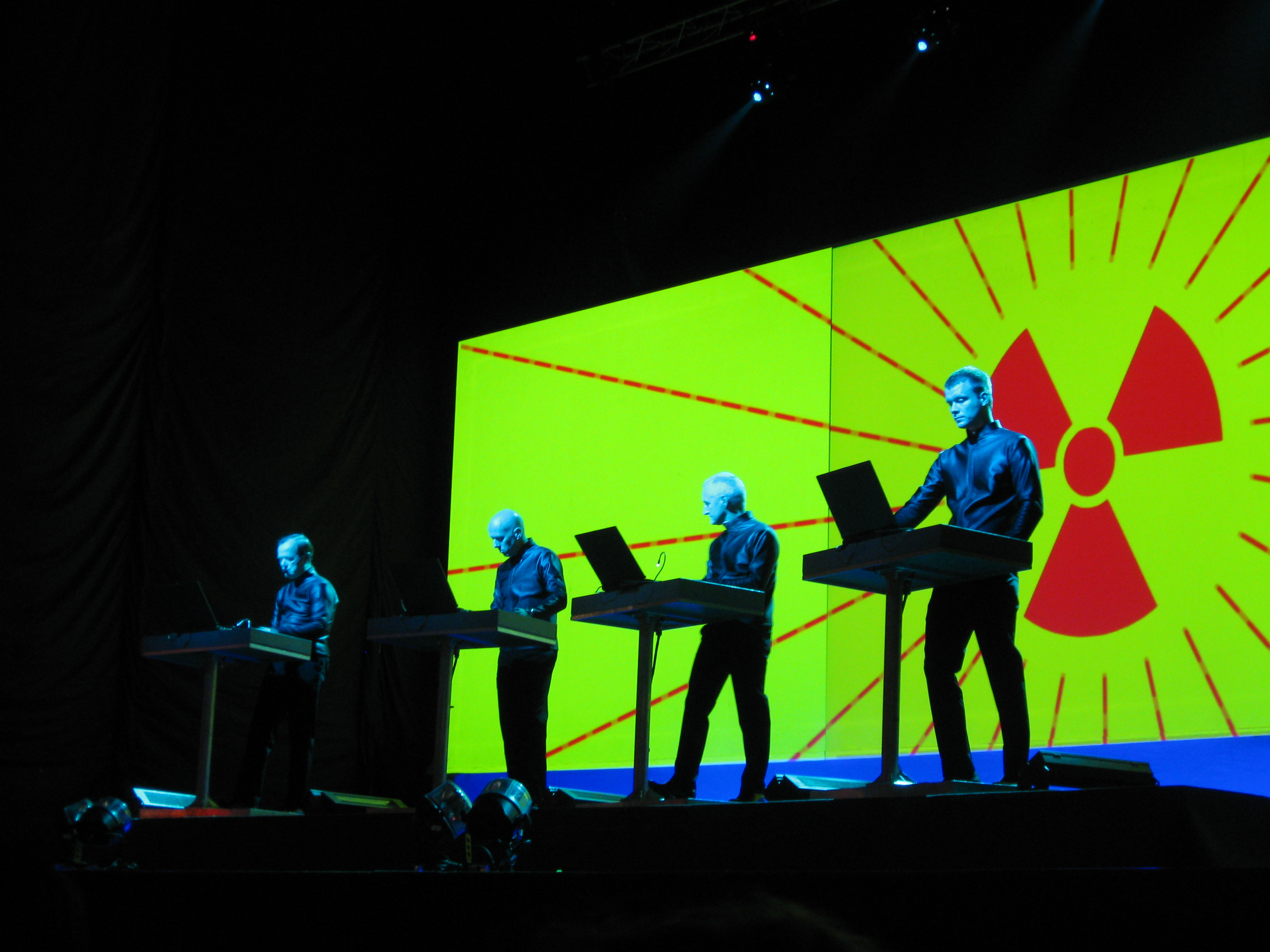 Liveauftritt im Kiew (organisiert durch PinchukArtCentre)